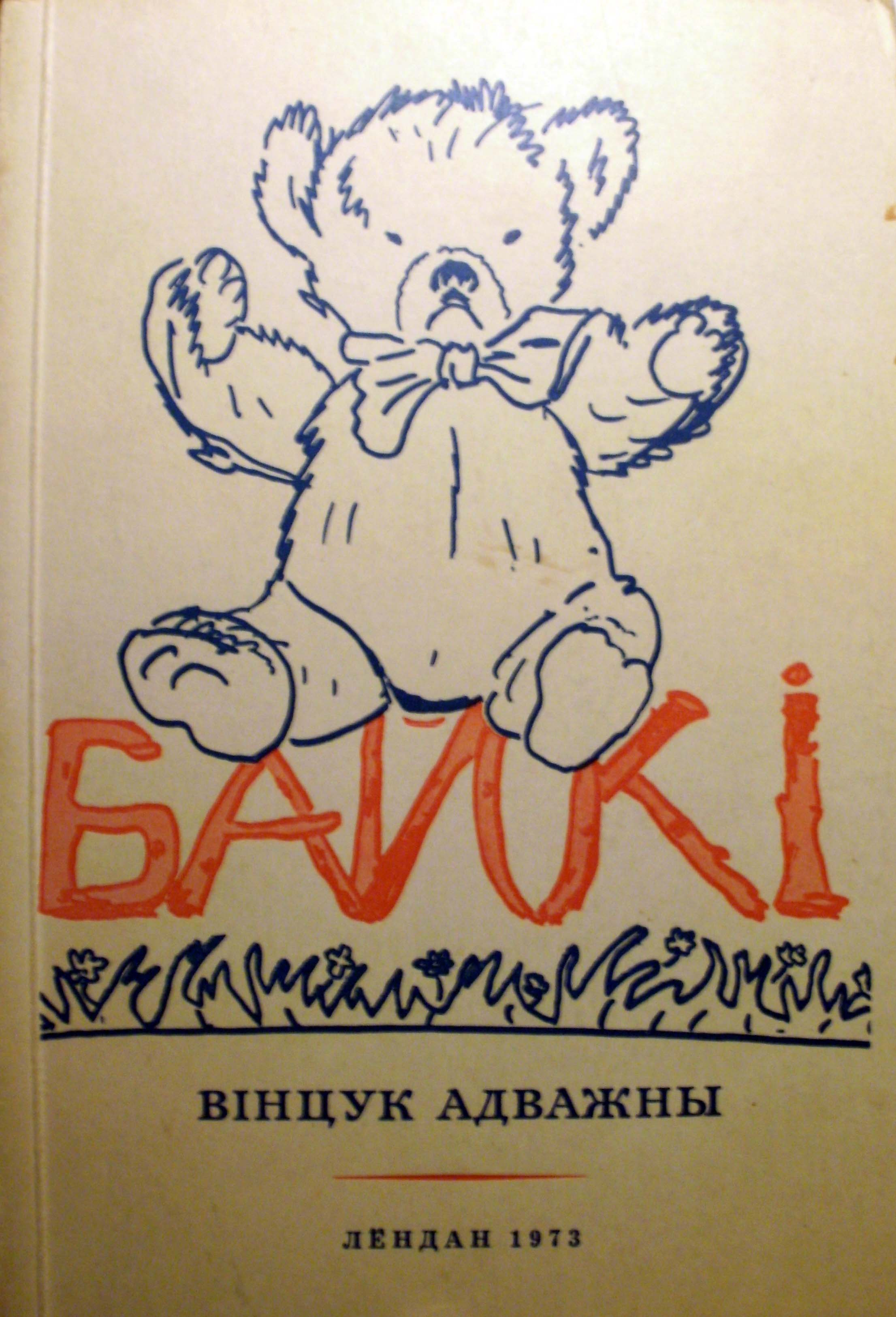 Вінцук Адважны-Байкі, Лондан, 1973. Апошняе прыжыццёвае выданне аўтара.